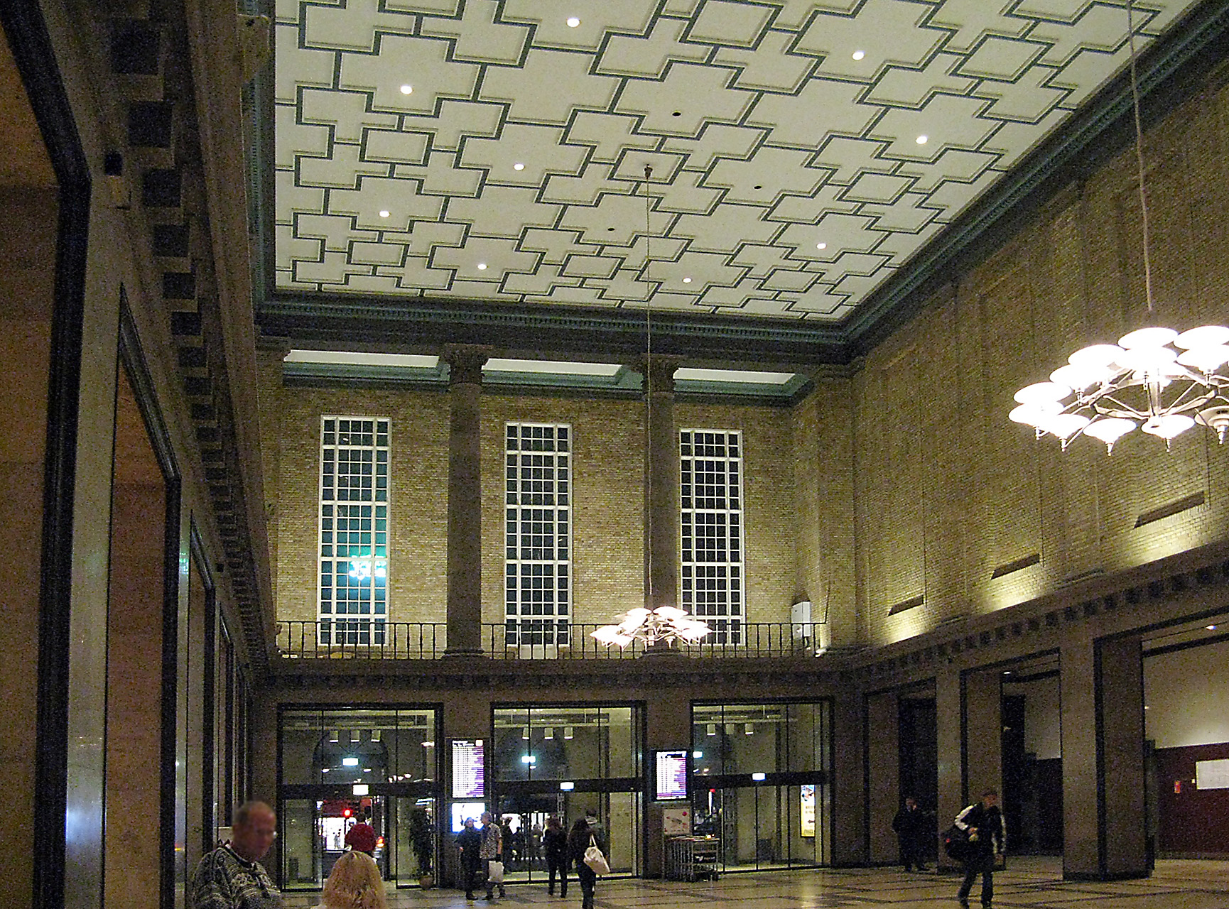 Århus Hovedbanegård forhallen